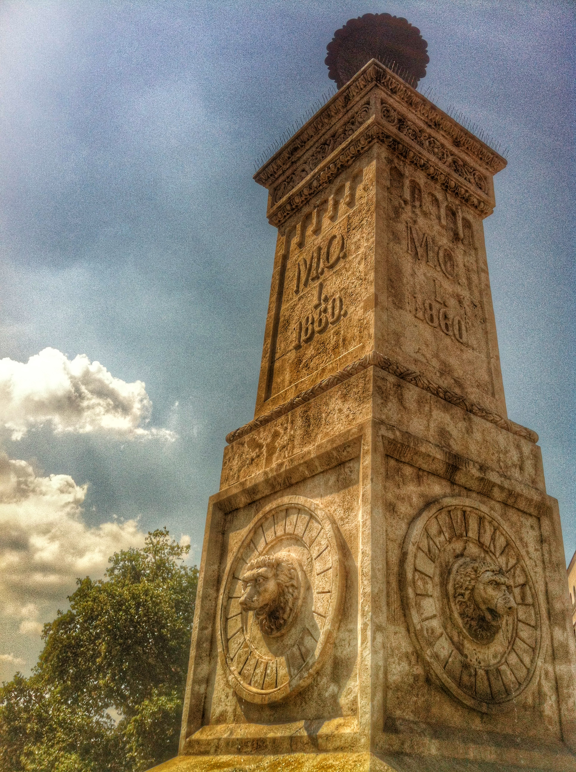 Српски (ћирилица): Подигнута 1860.године.